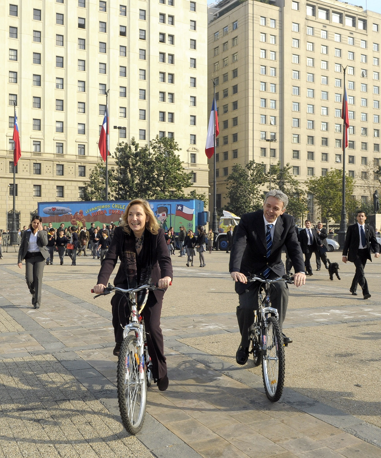 Campaña Buena Energía